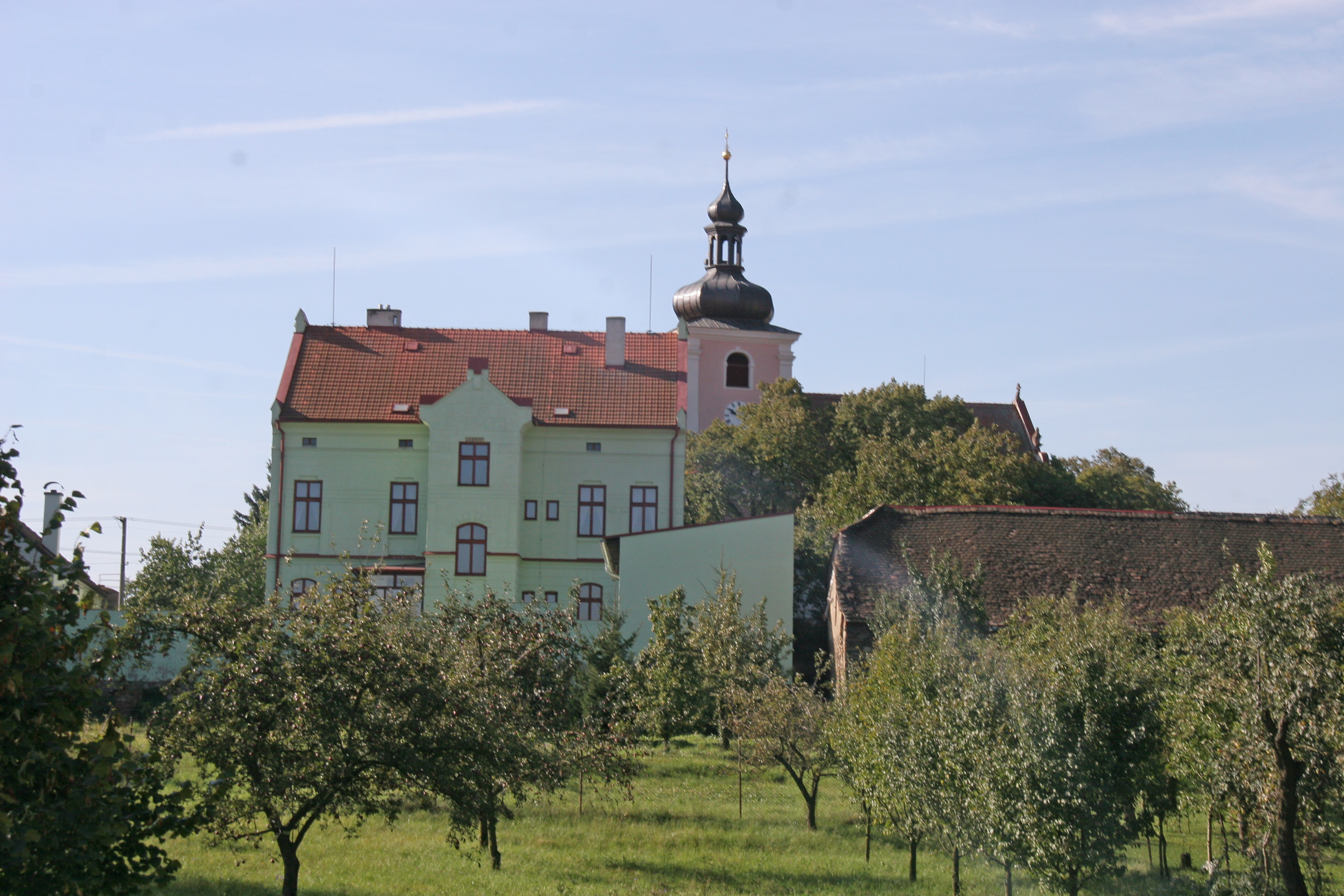 Mašovice kostel a fara